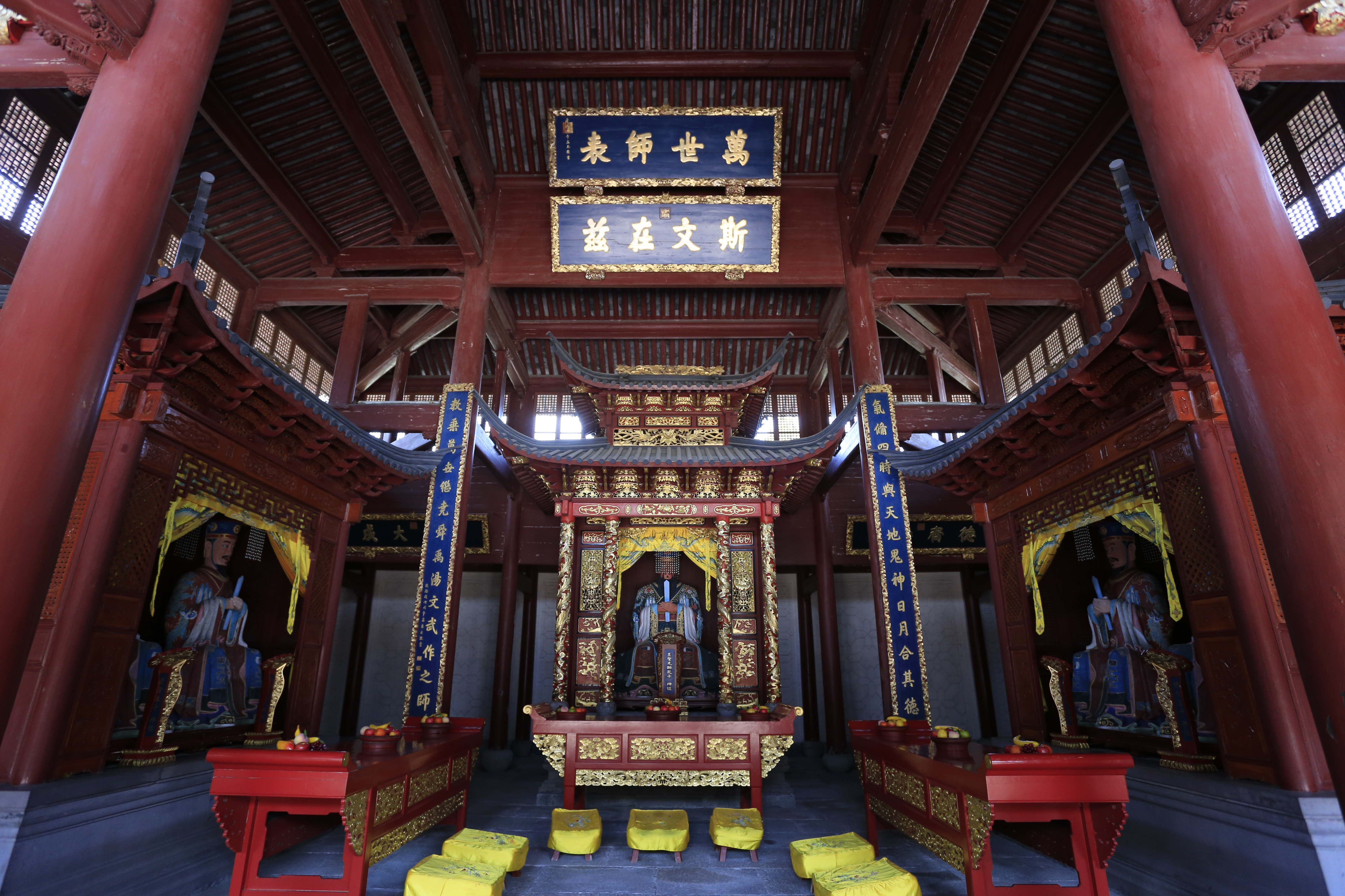 宁波市慈城孔庙 —— 大成殿